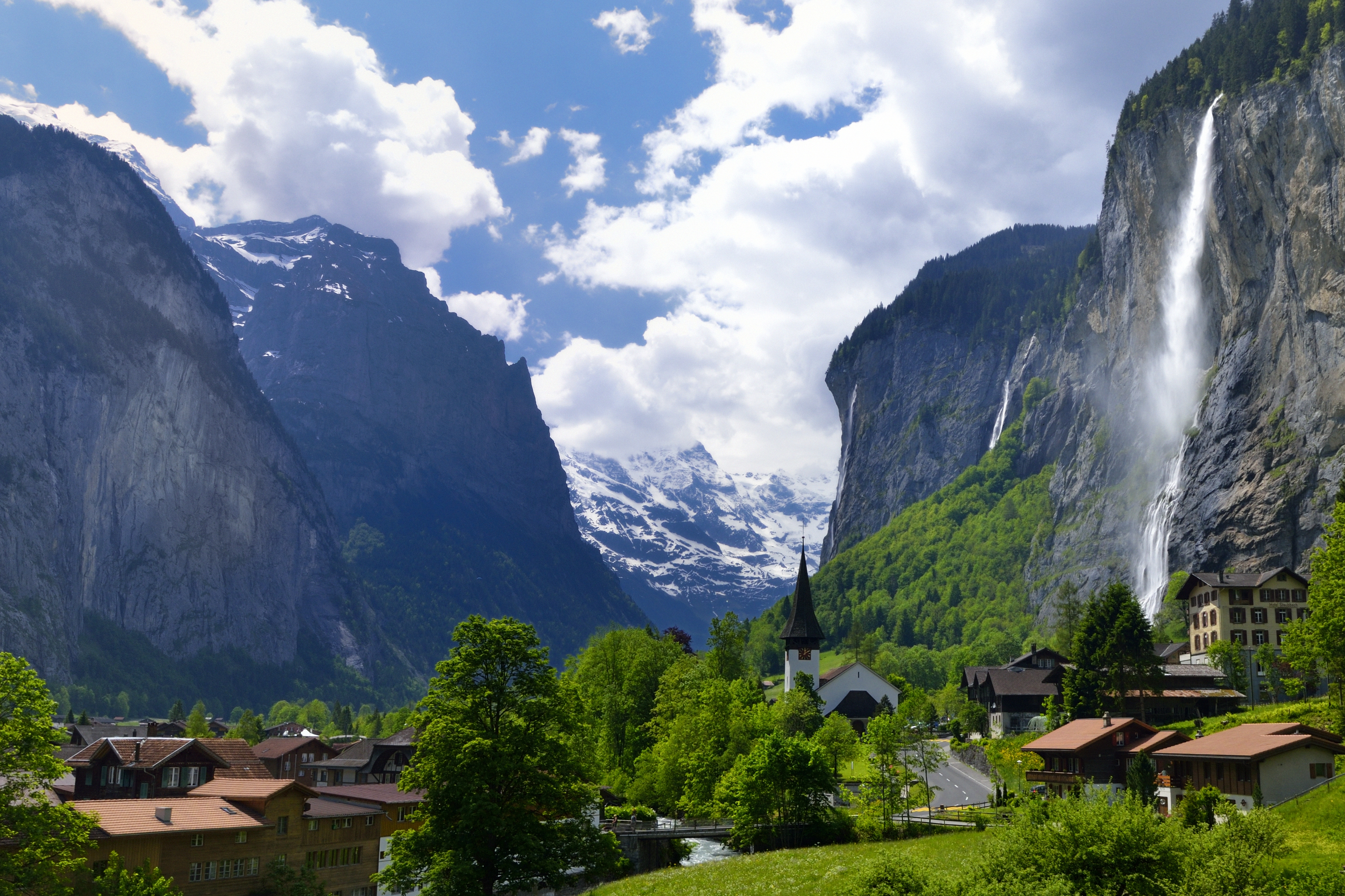 Lauterbrunnen